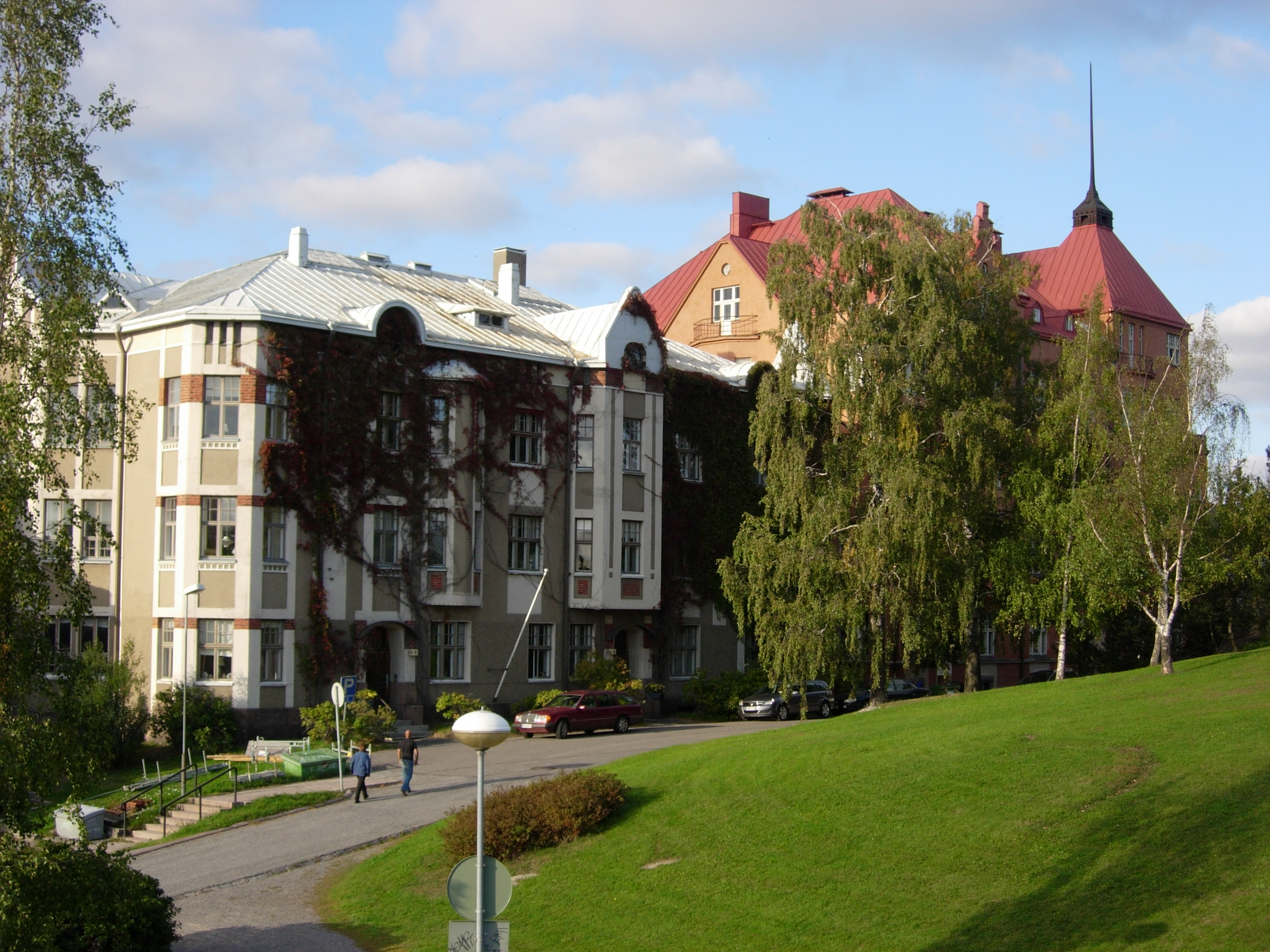 Puolalanpuisto 3 (?), Turku.